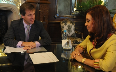 La presidenta Cristina Fernández recibió en su despacho al presidente del Banco Central, Martín Redrado, quien le informó que las reservas llegaron a u$s 50.000 millones.